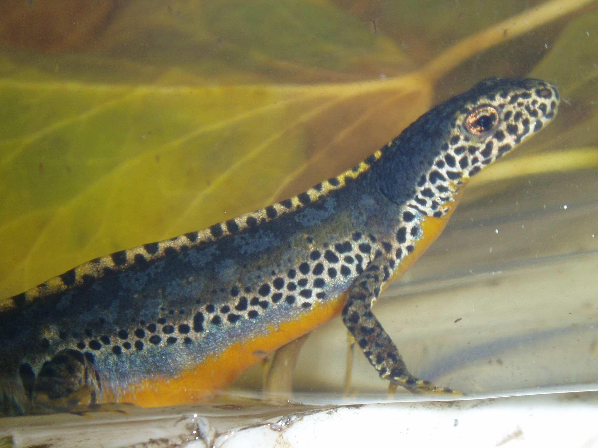 Triturus alpestris (M).